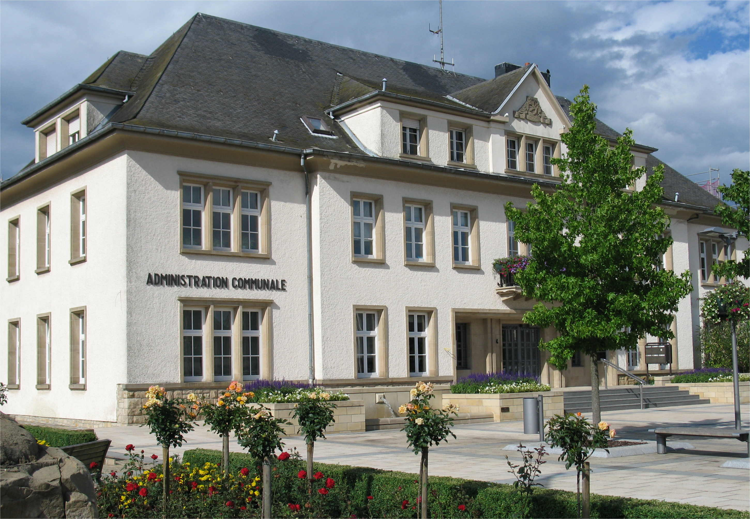 D'Gemeng vu Stengefort